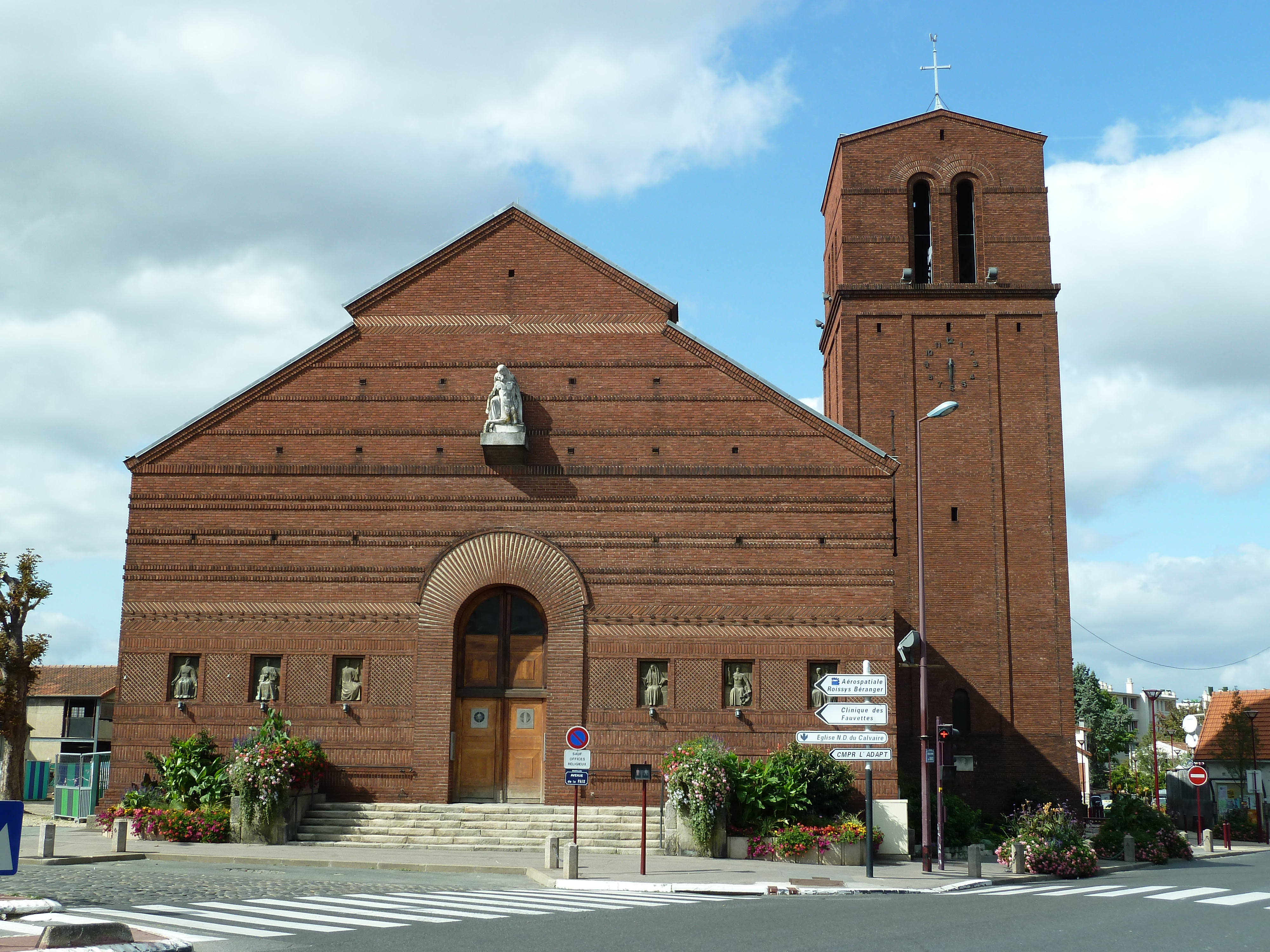 Église Notre-Dame-du-Calvaire - Châtillon - Haut-de-Seine – France – Mérimée PA92000012 .